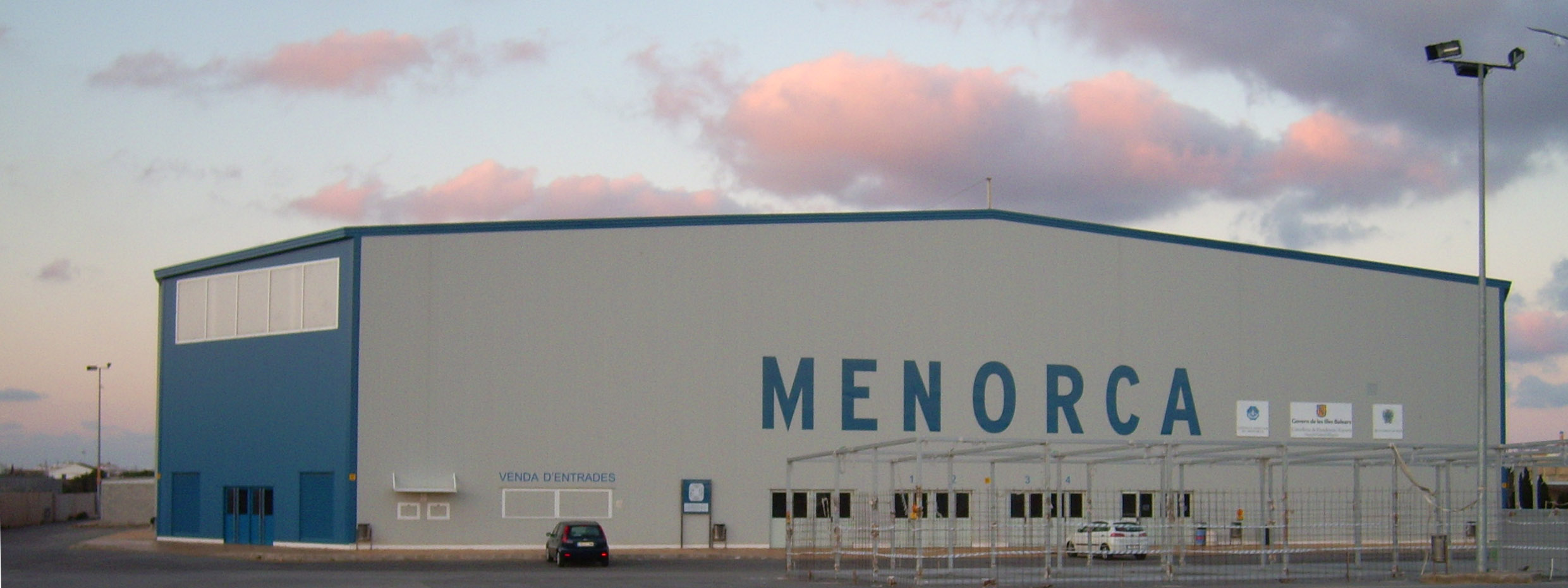 Pavello Menorca.